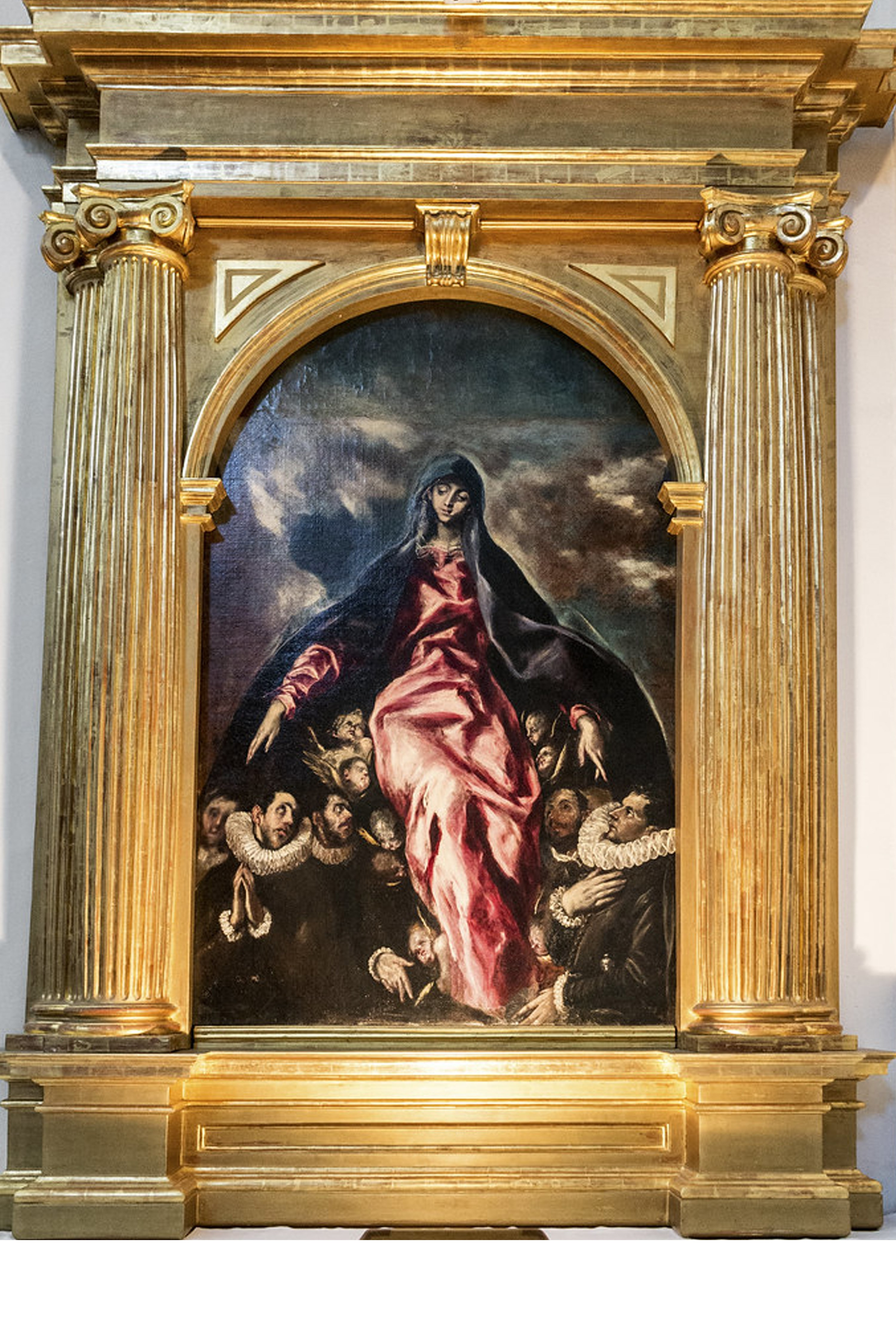 És el Retaule lateral exterior dret.de l'Hospitat de la Caridad d'Illescas (Toledo), obra d'El Greco.